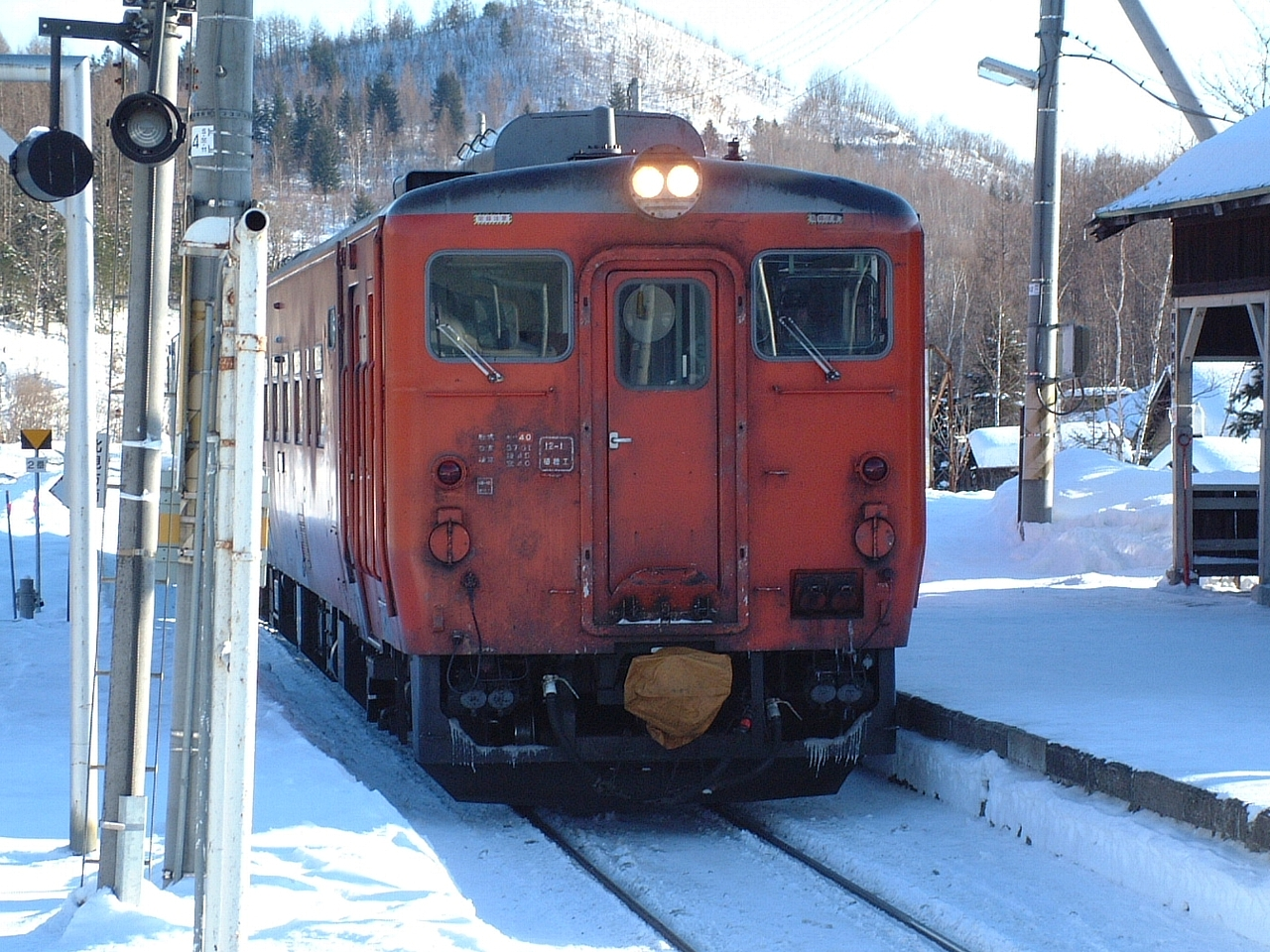 JR北海道キハ40形気動車（キハ40 764 映画「鉄道員」ではキハ12 23、現在は廃車） JR北海道 石北本線 金華駅で撮影